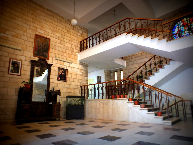 երուսաղեմի ժառանգավորաց վարժարան